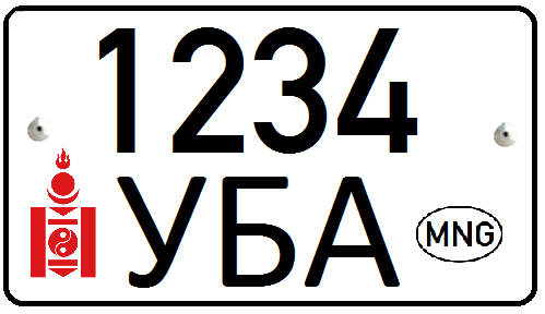 نمونه پلاک مغولستان